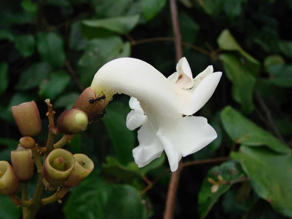 Amphilophium crucigerum (L.) L.G.Lohmann - ( bas. Bignonia crucigera L. ; sin. hom. Pithecoctenium crucigerum (L.) A.H.Gentry ) - BIGNONIACEAE - Parque Estadual dos Pirineus - Pirenópolis - Goiás - Brasil.